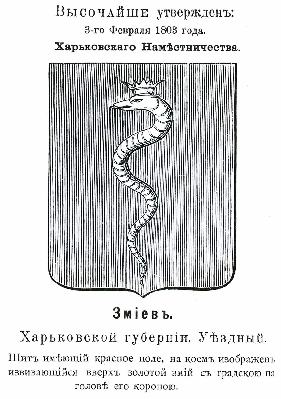 Official Russian Empire coat of arms Zmiev. Т.н. "гласный" герб (змея) Российской Империи уездного города Змиев Харьковской губернии с официальным описанием в Гербовнике Винклера.